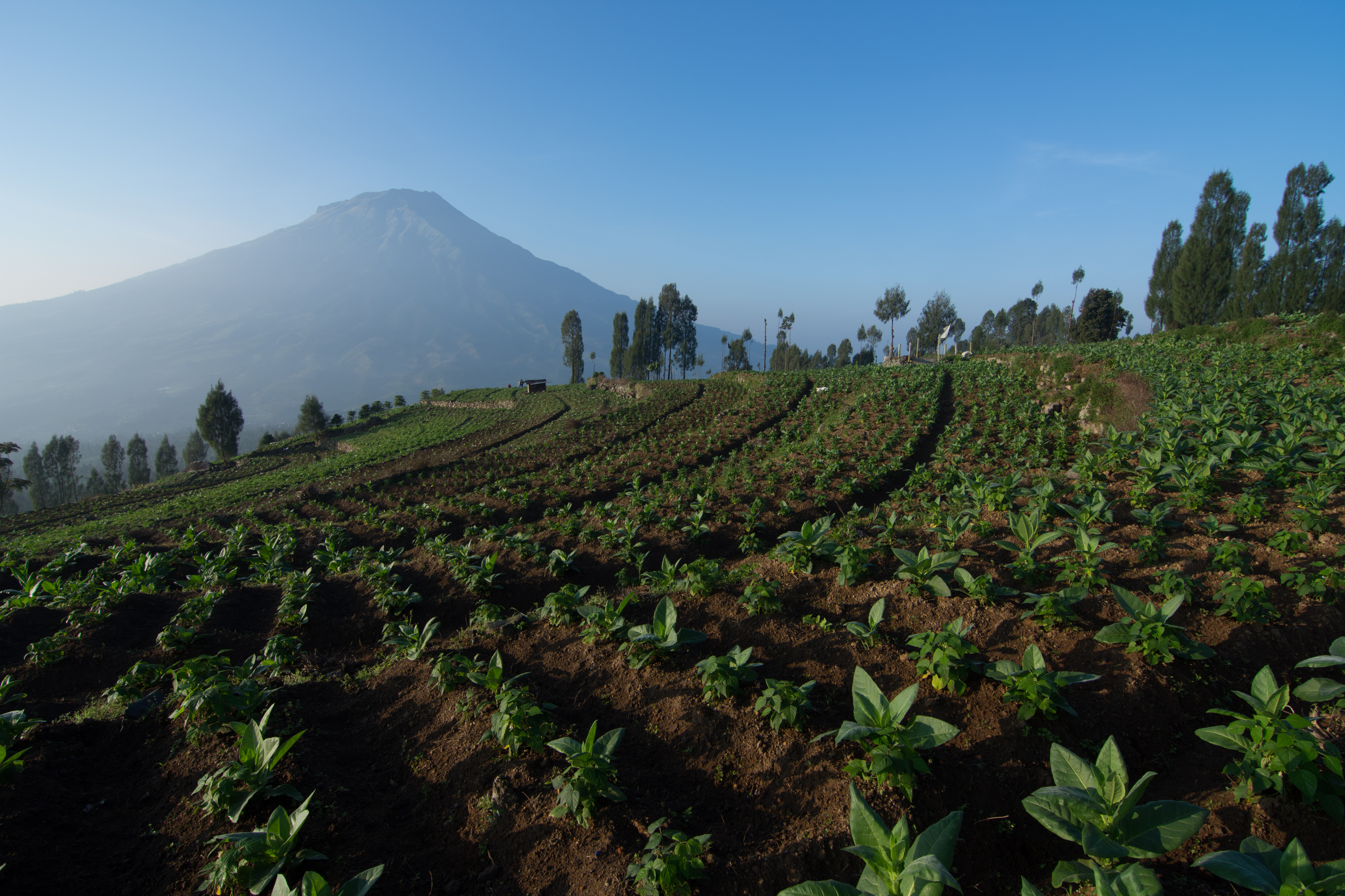 Tanaman Tembakau di Posong kaki Gunung Sindoro Jawa Tengah